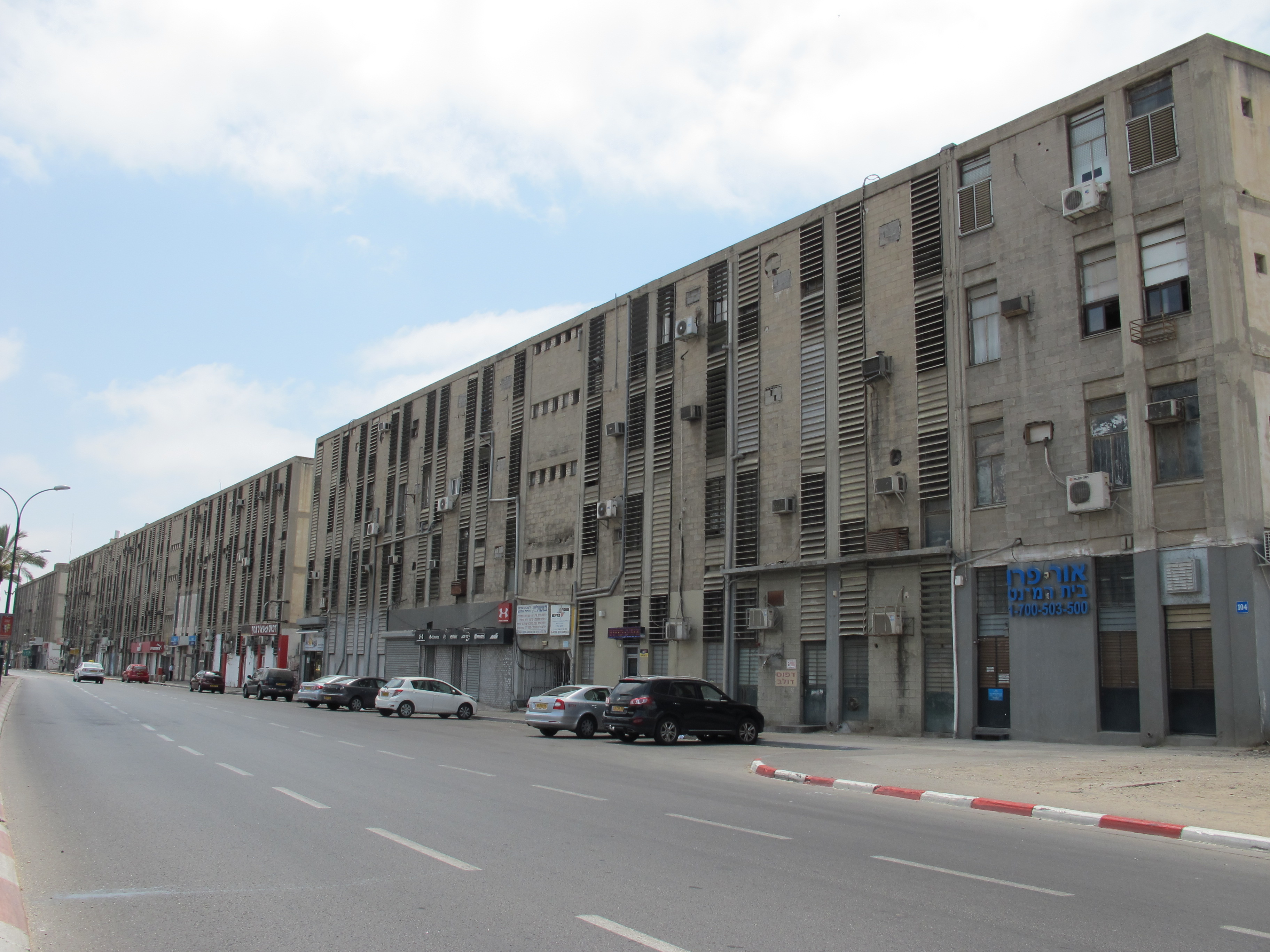 כמה ממבני קרית המלאכה בשדרות הר ציון בתל אביב, אדריכל: יצחק רפפורט, 1965, מאי 2012